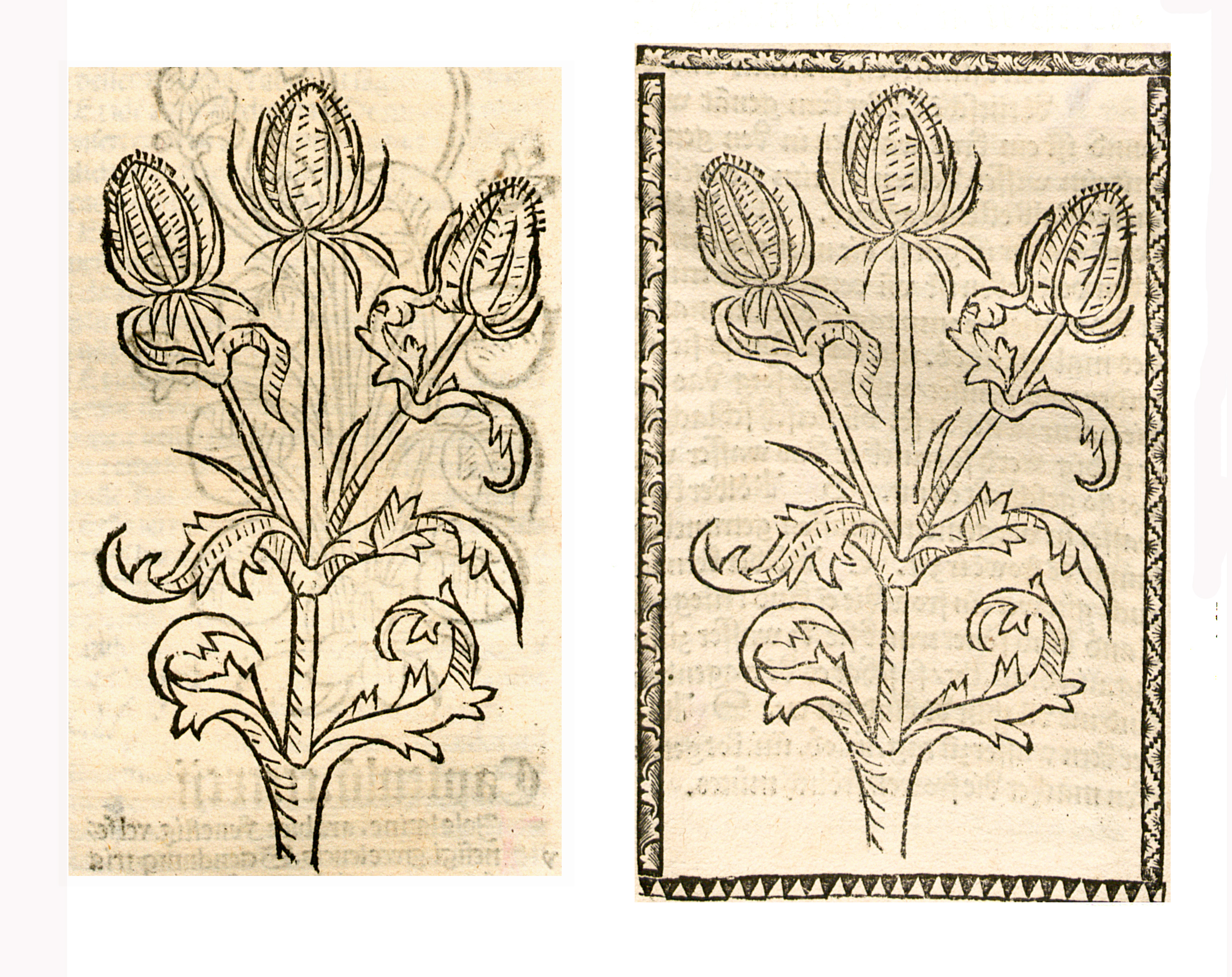 Abbildung von: Karten (Dipsacus)